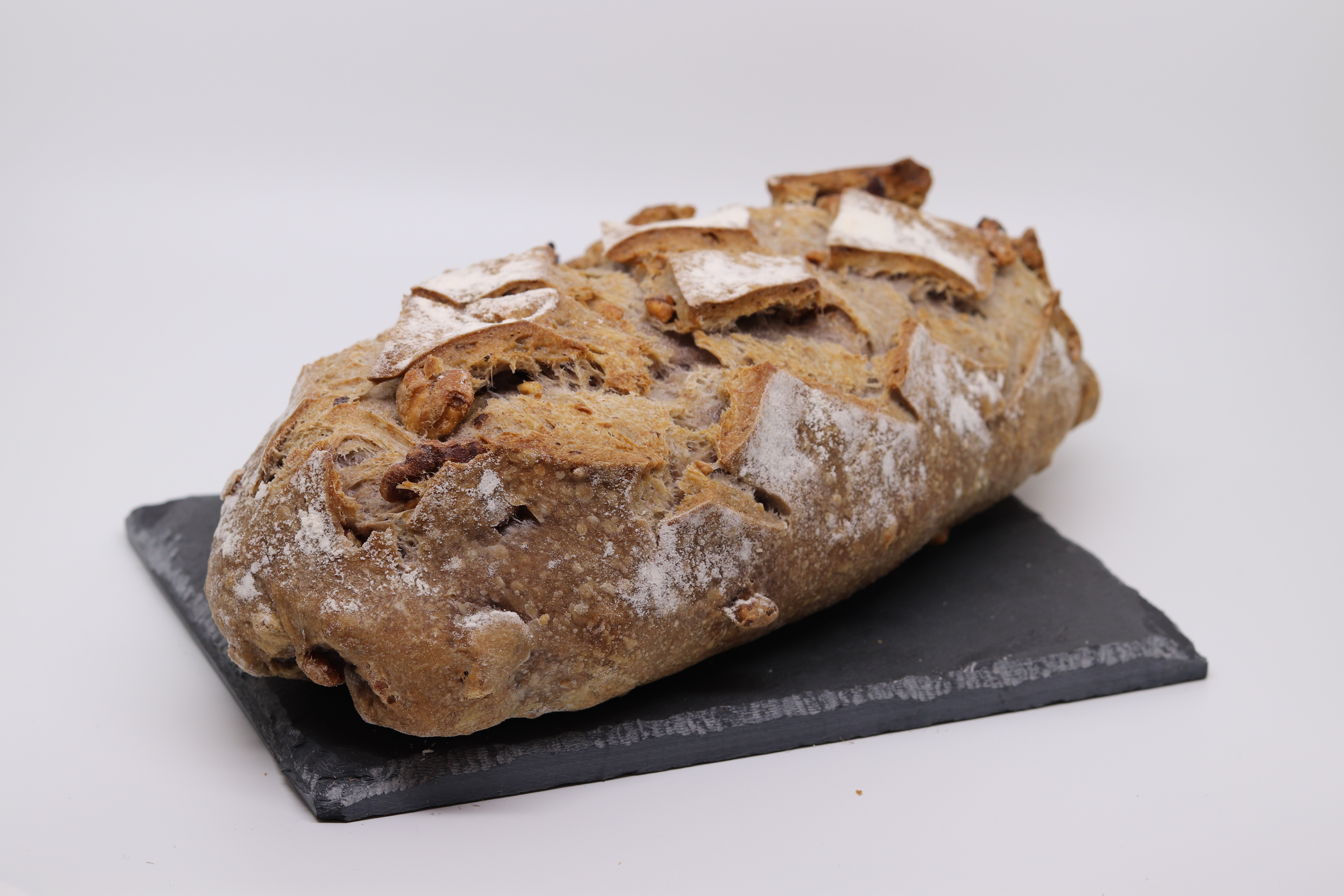 Second atelier Wikifromage. L'atelier a eu lieu à l'édifice de BAnQ Vieux-Montréal.